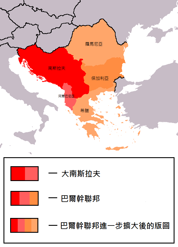 巴爾幹聯邦構想中文圖，原來自